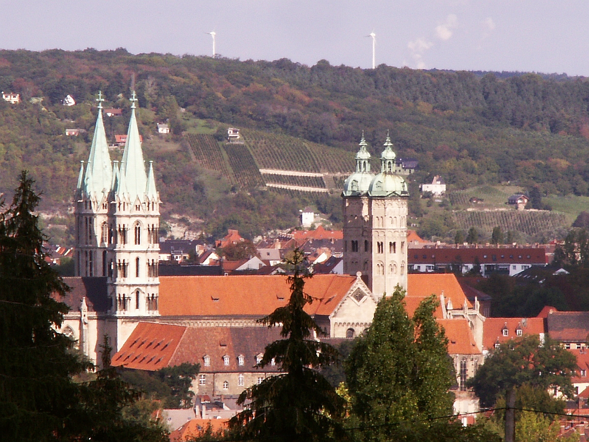 Naumburg an der Saale. Naumburger Dom St. Peter und Paul. Ansicht von Süd.